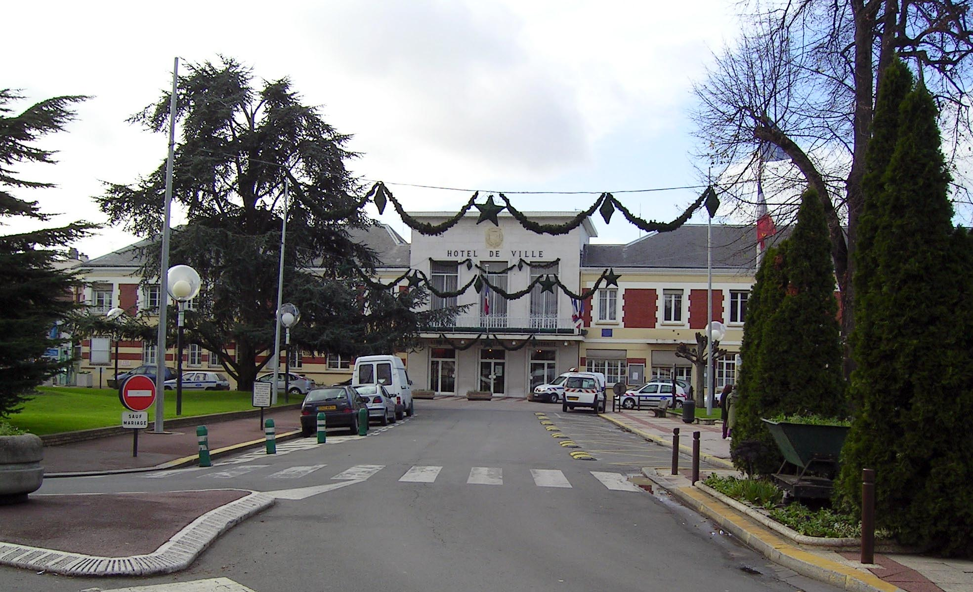 Livry-Gargan (France) - L'Hôtel-de-ville - Décembre 2006 Photo personnelle (own work) de Marianna